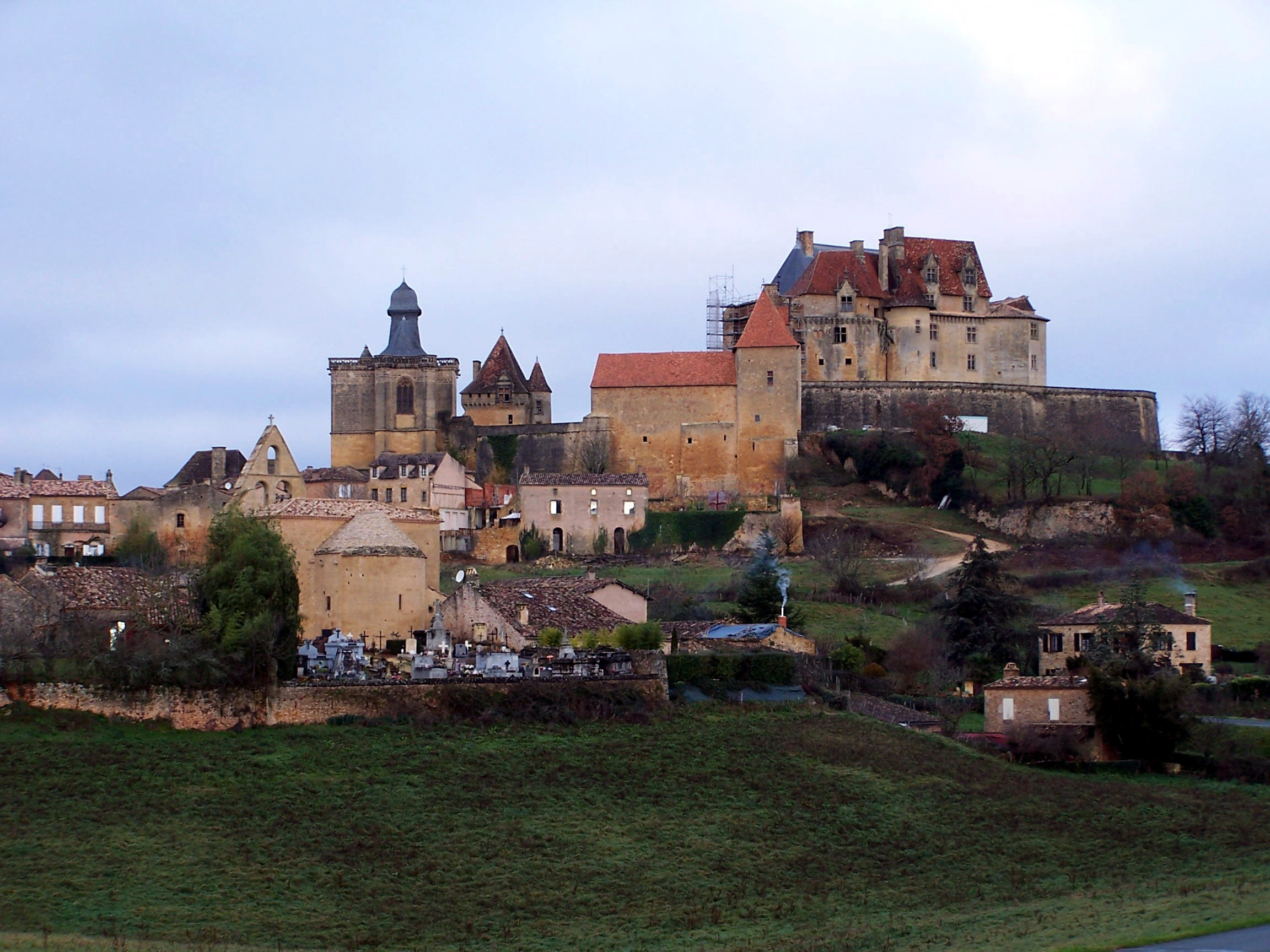 Biron Est This building is en partie classé, en partie inscrit au titre des Monuments Historiques. .